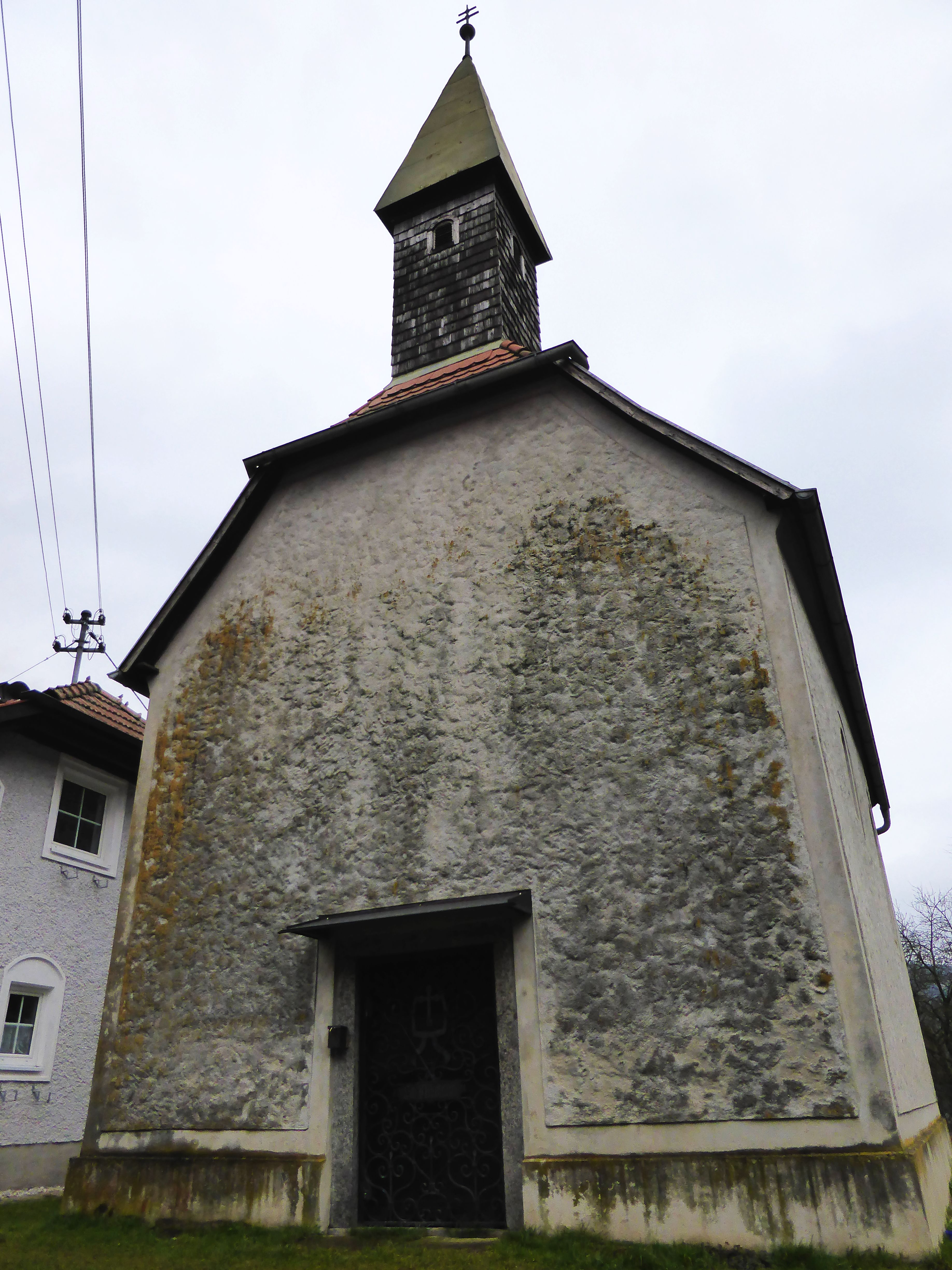 Kath. Filialkirche St. Nikola